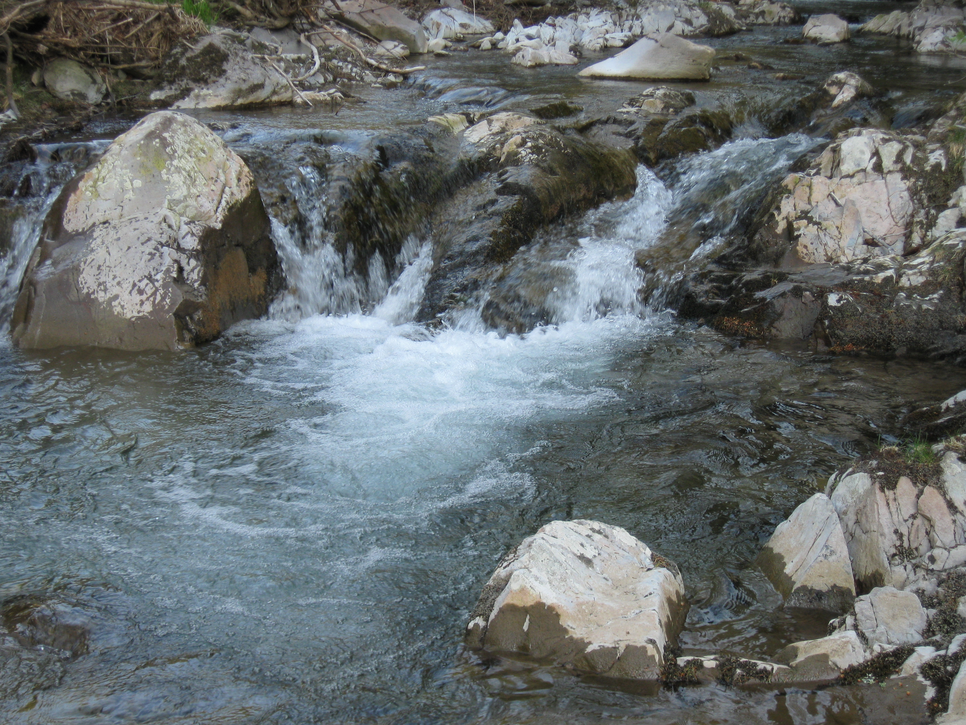 Die Katze ist ein rechter Nebenfluss der Schwarza.